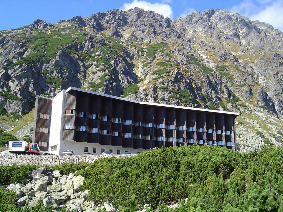 Sliezsky dom under Gerlachovsky stit